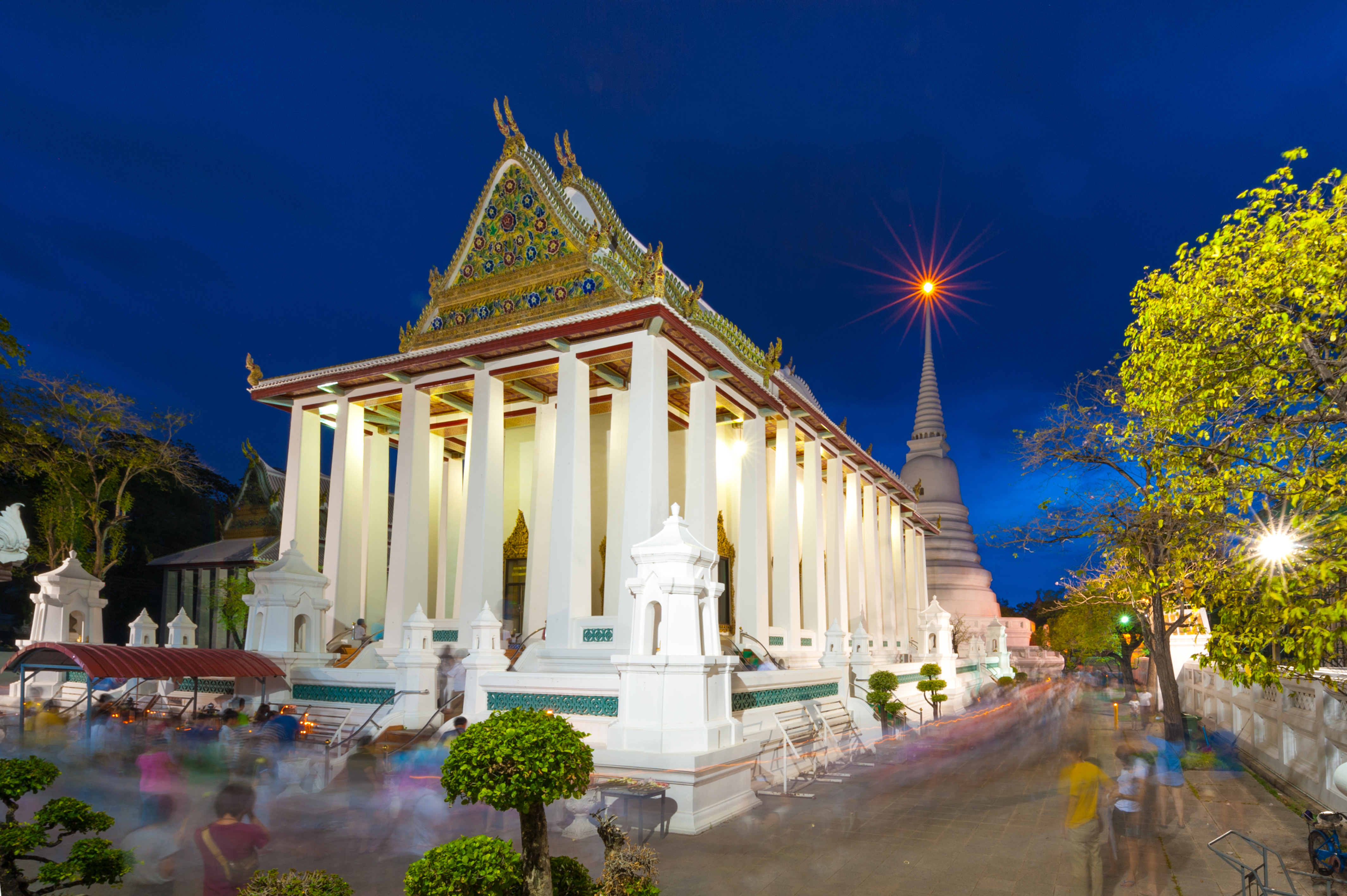 วัดเฉลิมพระเกียรติวรวิหาร จ. นนทบุรี เป็นวัดริมแม่น้ำเจ้าพระยาแห่ง ที่มีชื่อเสียงด้านสถาปัตยกรรมงดงาม ได้แก่ โบสถ์ ซึ่งมีรูปแบบสถาปัตยกรรมไทยผสมจีนตามแบบพระราชนิยม